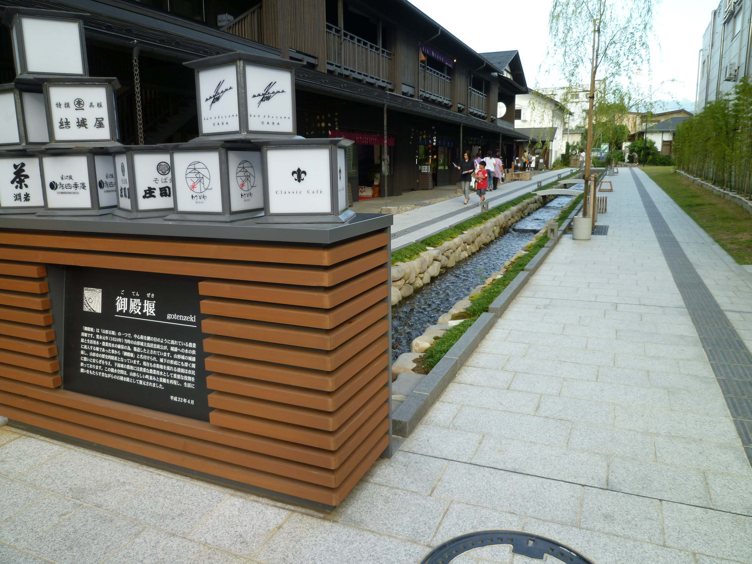 御殿堰（山形五堰）